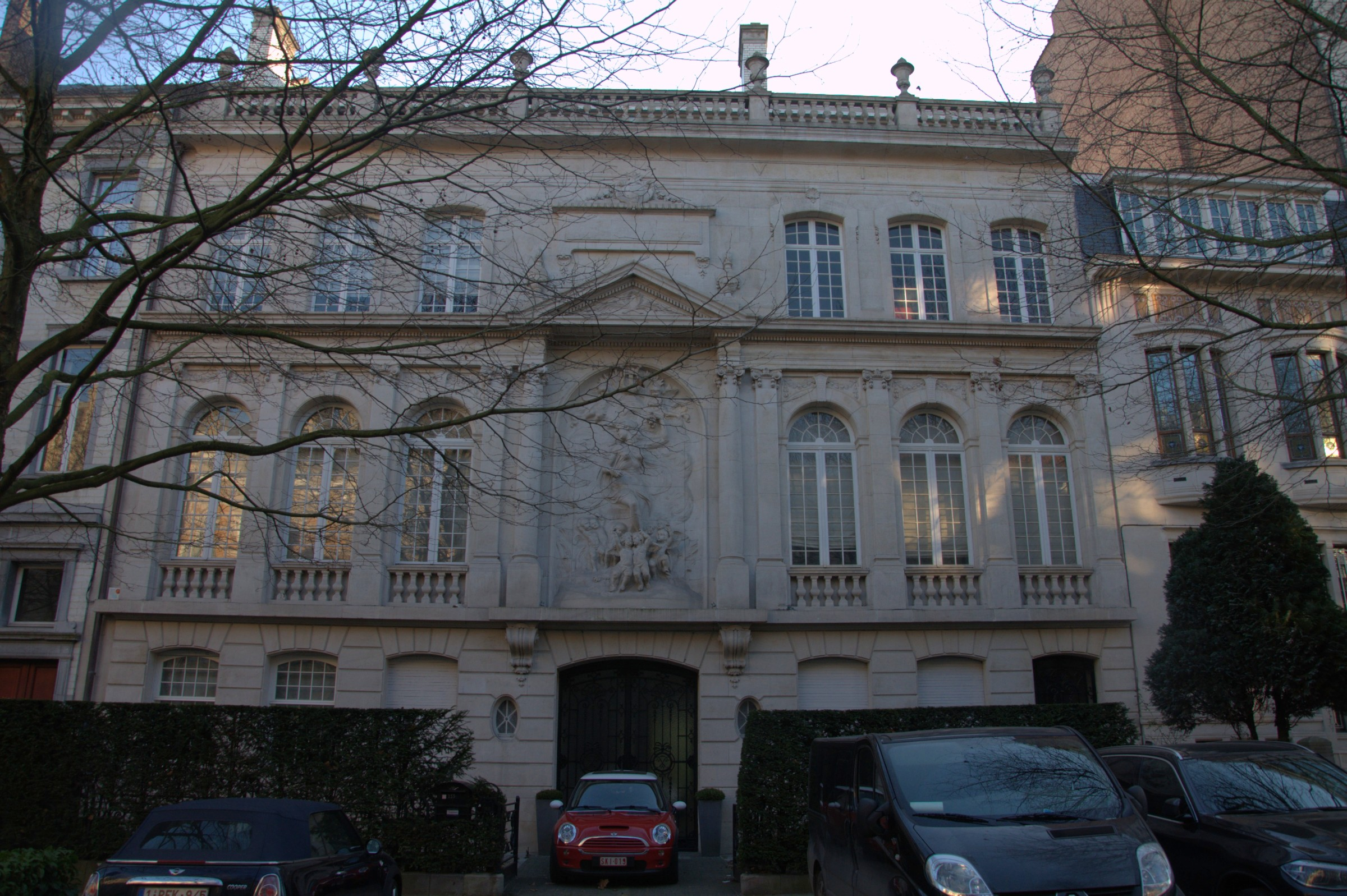 Hôtel Philippot, réalisé en 1905 par Jules Brunfaut, Avenue Molière 153-155, Forest